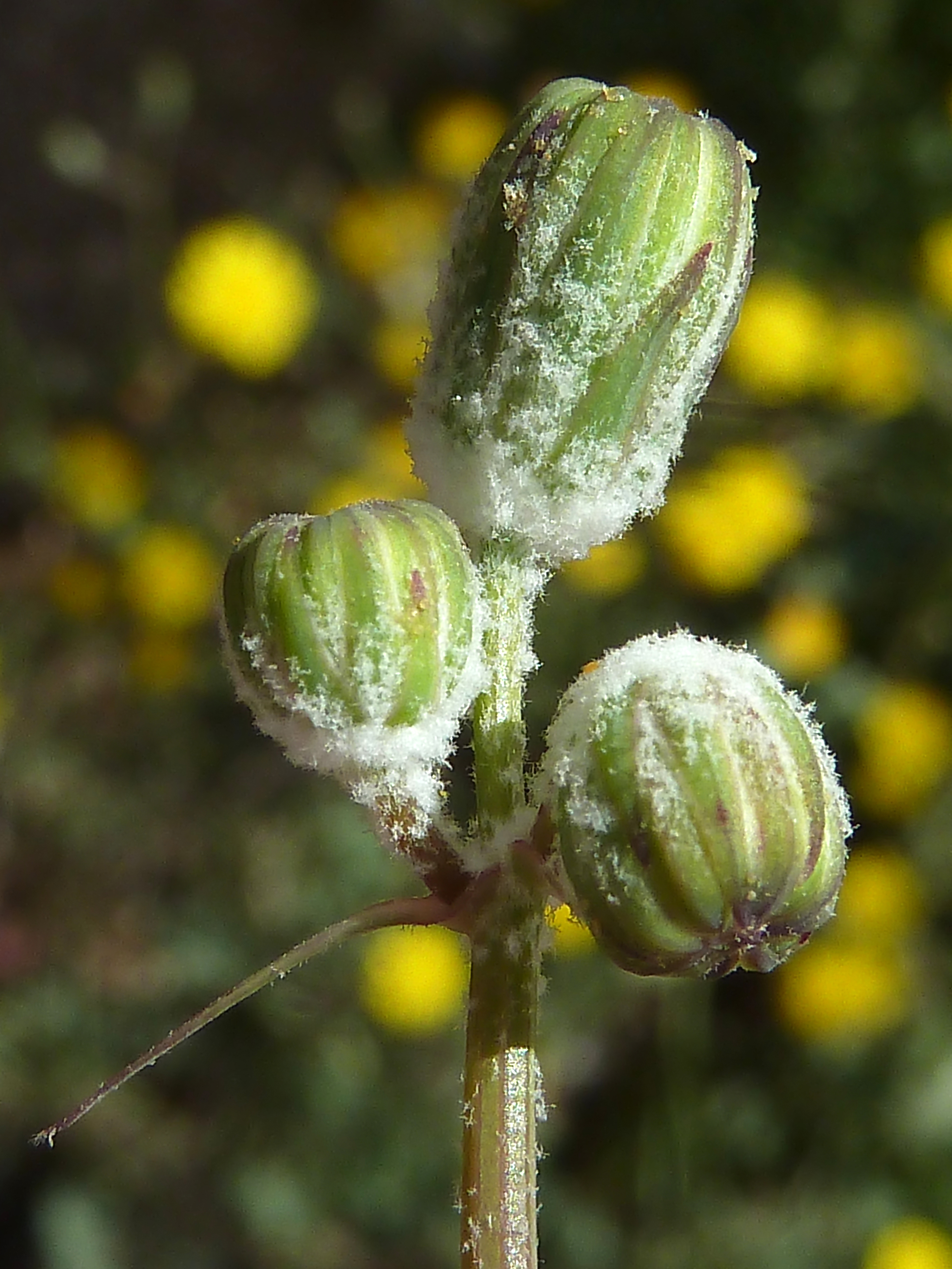 Sonchus tenerrimus - (cerraja menuda, cerraja tierna,...) - Capítulos en preantesis; borra aracnoideo-blanquecino en las bases. - Solar calle Compositor Manuel Berná García, Albatera (Provincia de Alicante, España).